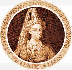 Turhan Sultan'ın bir portresi.